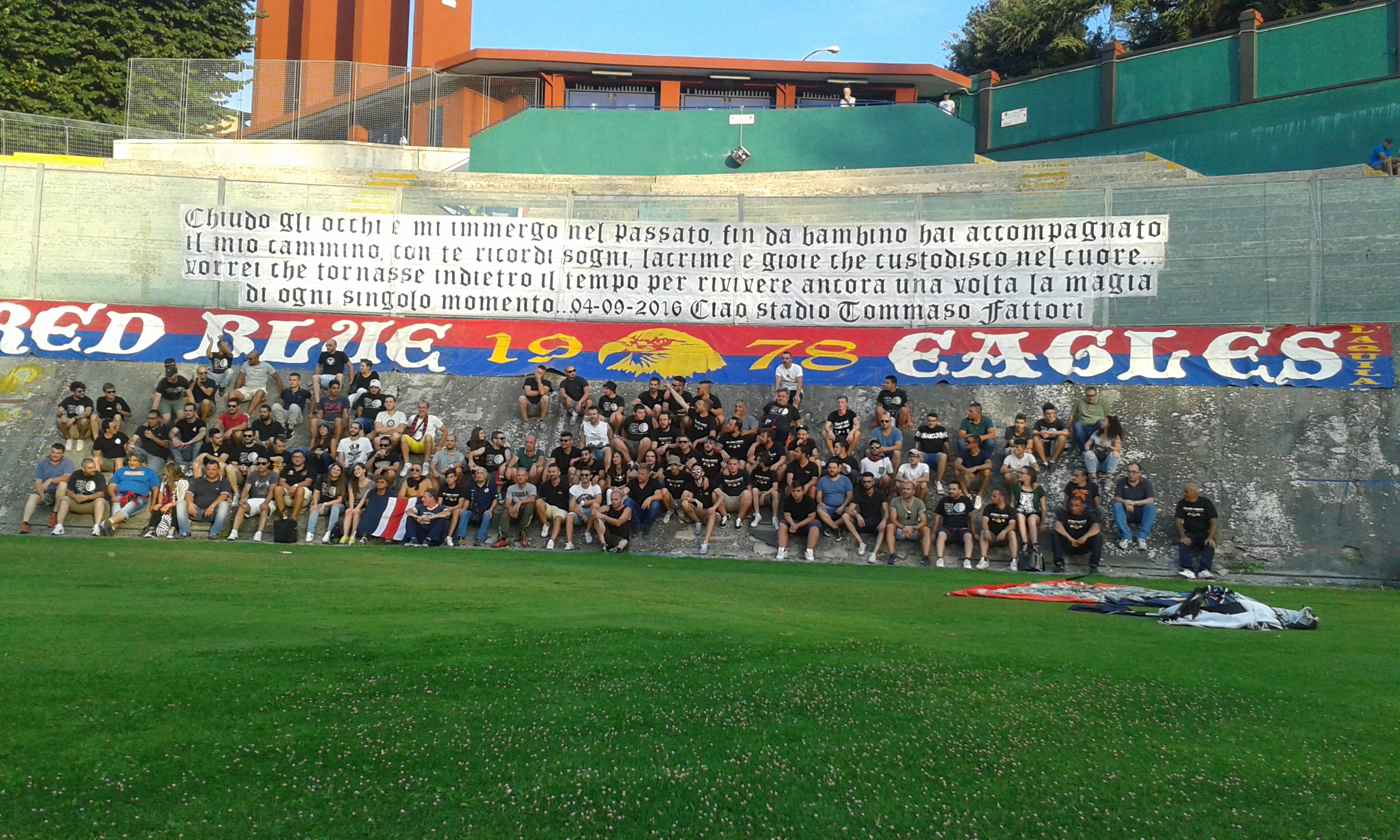 Il saluto allo stadio Fattori della tifoseria de L'Aquila Calcio 1927 dopo la prima partita nel nuovo impianto